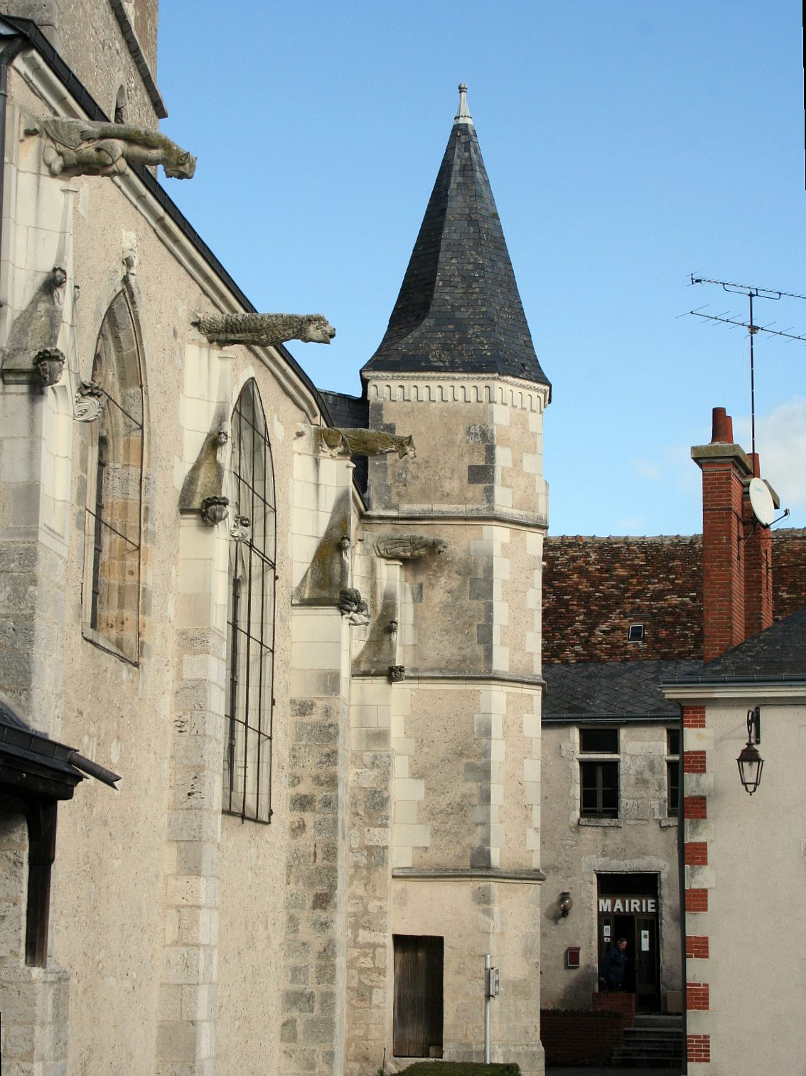 Église et mairie de Suèvres, Loir-et-Cher, France